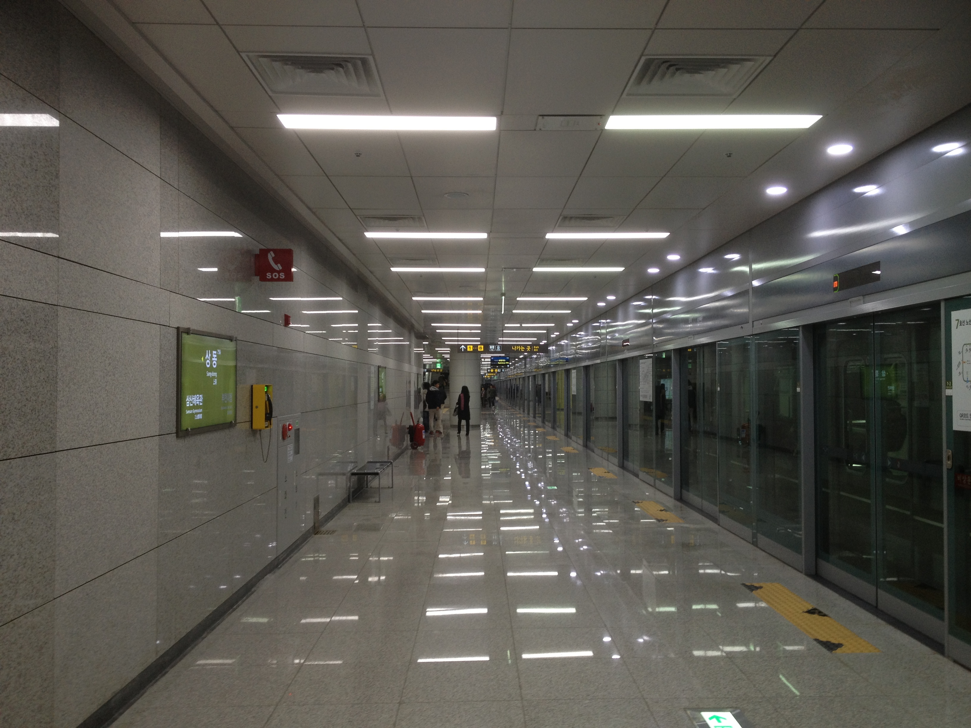 상동역 서울7호선 승강장